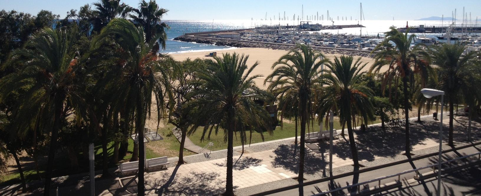 Playa del Prat d'en Forés - Seccion desembocadura del Regueral. Cambrils